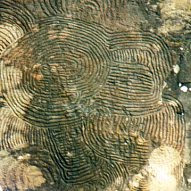 Petroglyphen